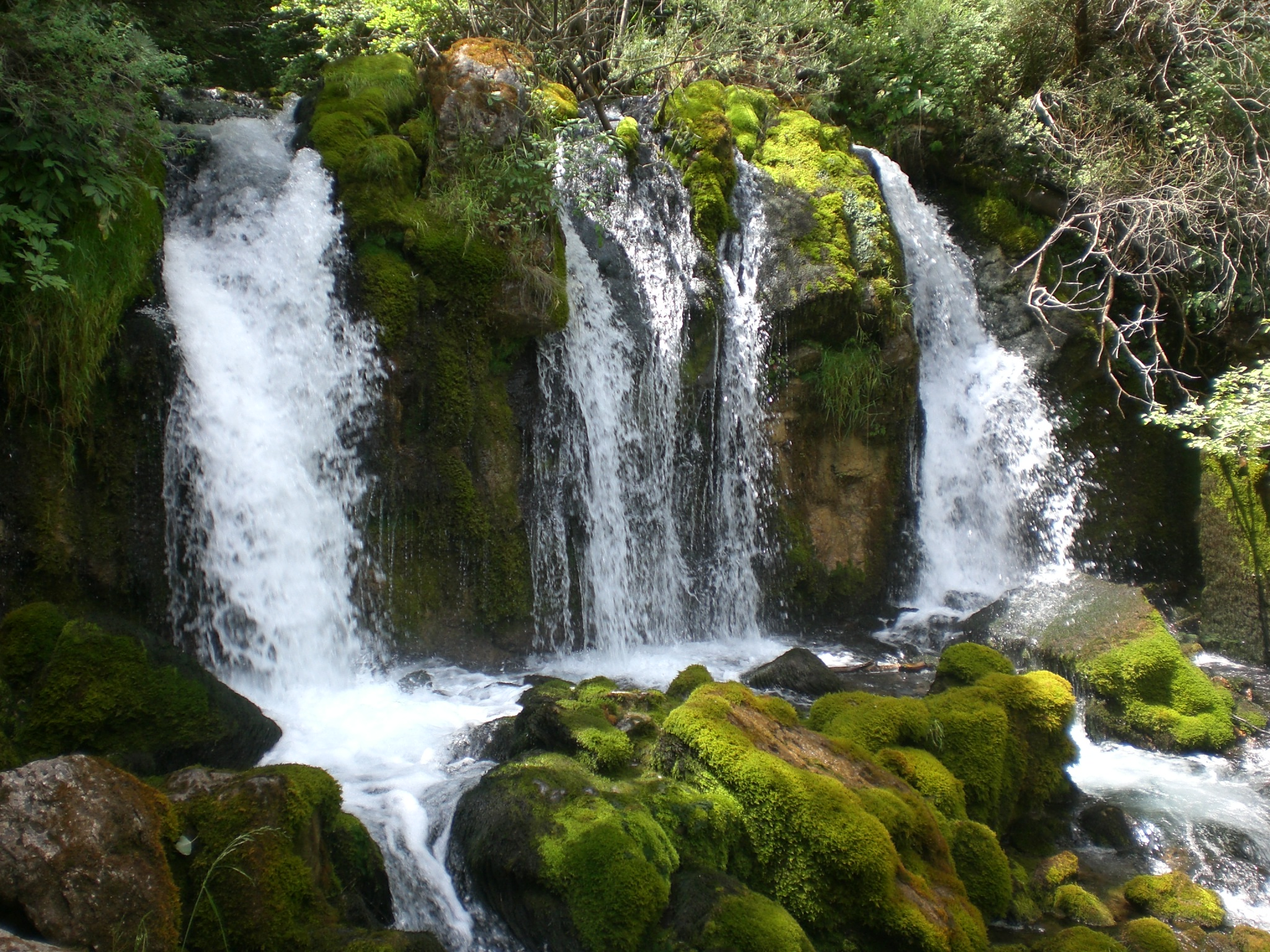 Riu Bastareny aprop de l'Adou